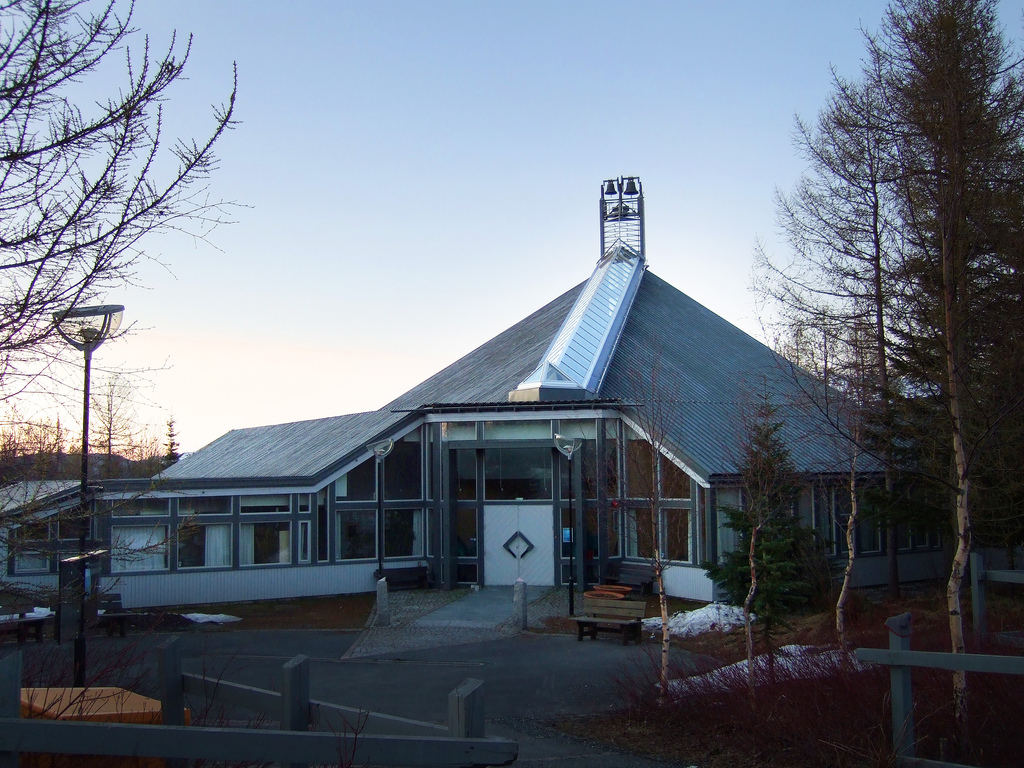 Grønnåsen Church in Tromsø, Norway